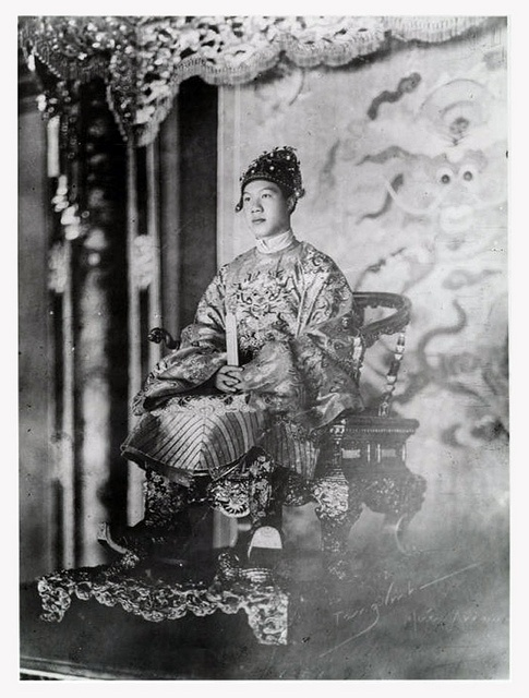 Bảo Đại au pouvoir